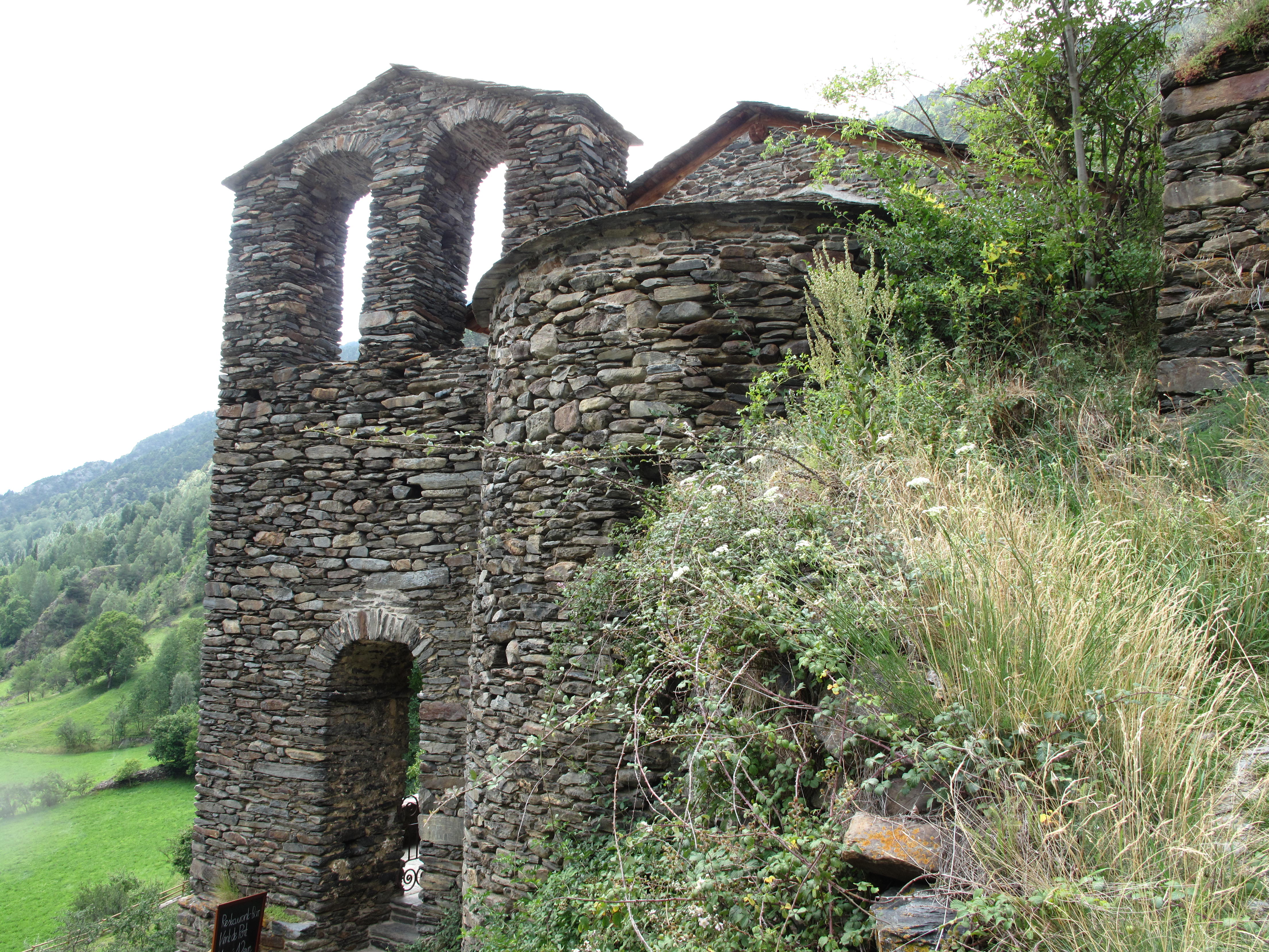 Esglesia romànica de Sant Feliu a la Força d'Âreu. Vall Farrera. Pallars sobirà